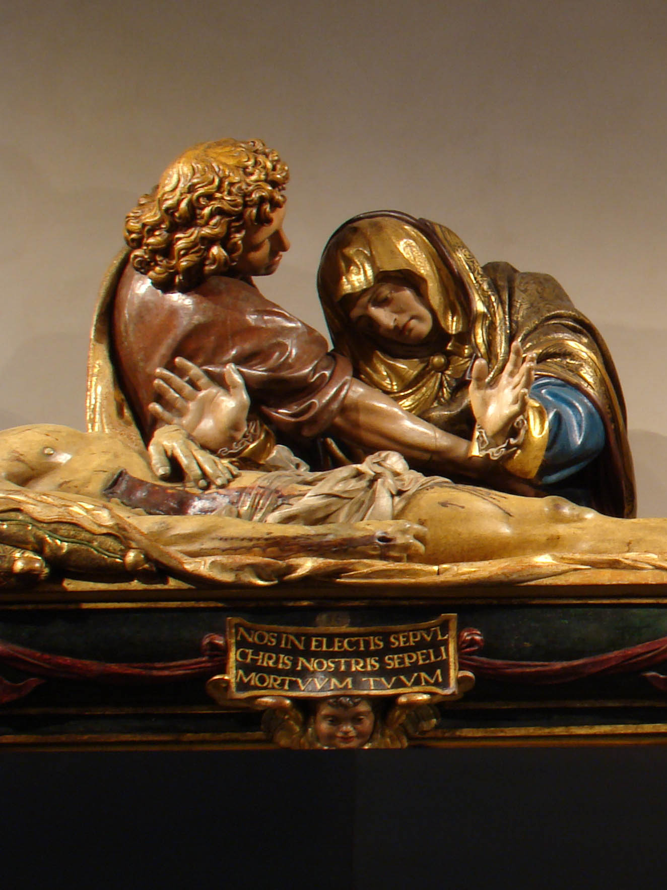 El Santo Entierro, detalle de la escultura en madera policromada del escultor renacentista Juan de Juni, que perteneció al retablo de la capilla del Sepulcro o del Obispo de Mondoñedo en el claustro del desaparecido convento de San Francisco en Valladolid, actualmente en el Museo Nacional de Escultura de Valladolid, España.